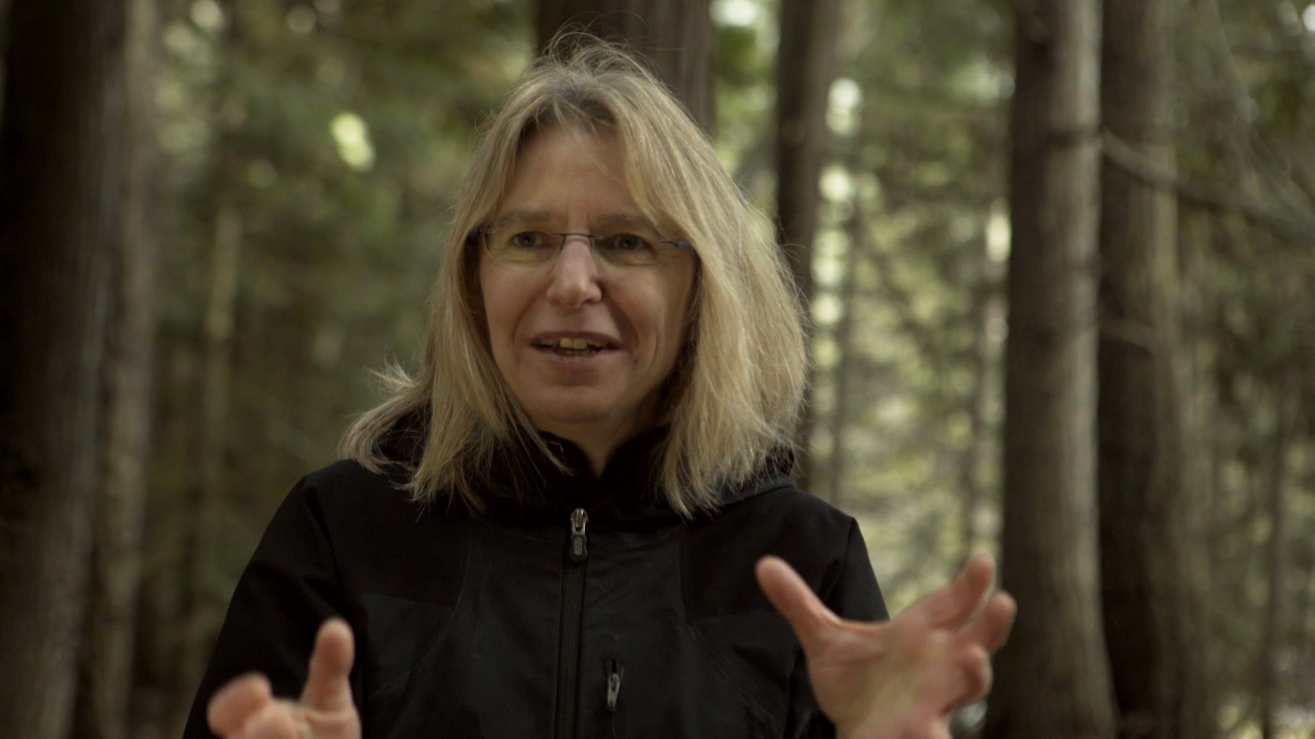 Suzanne Simard während der Dreharbeiten